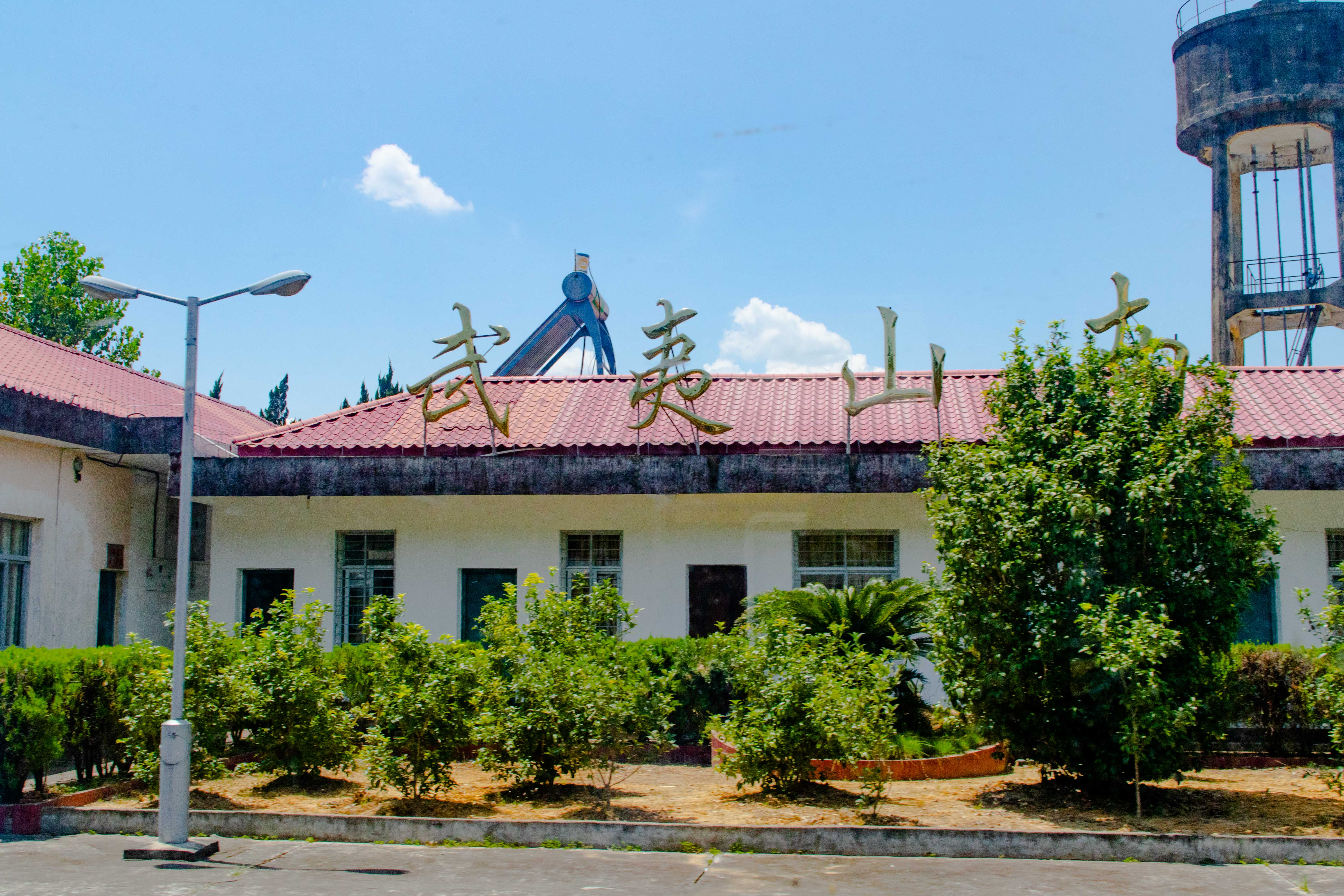 武夷山南站站房